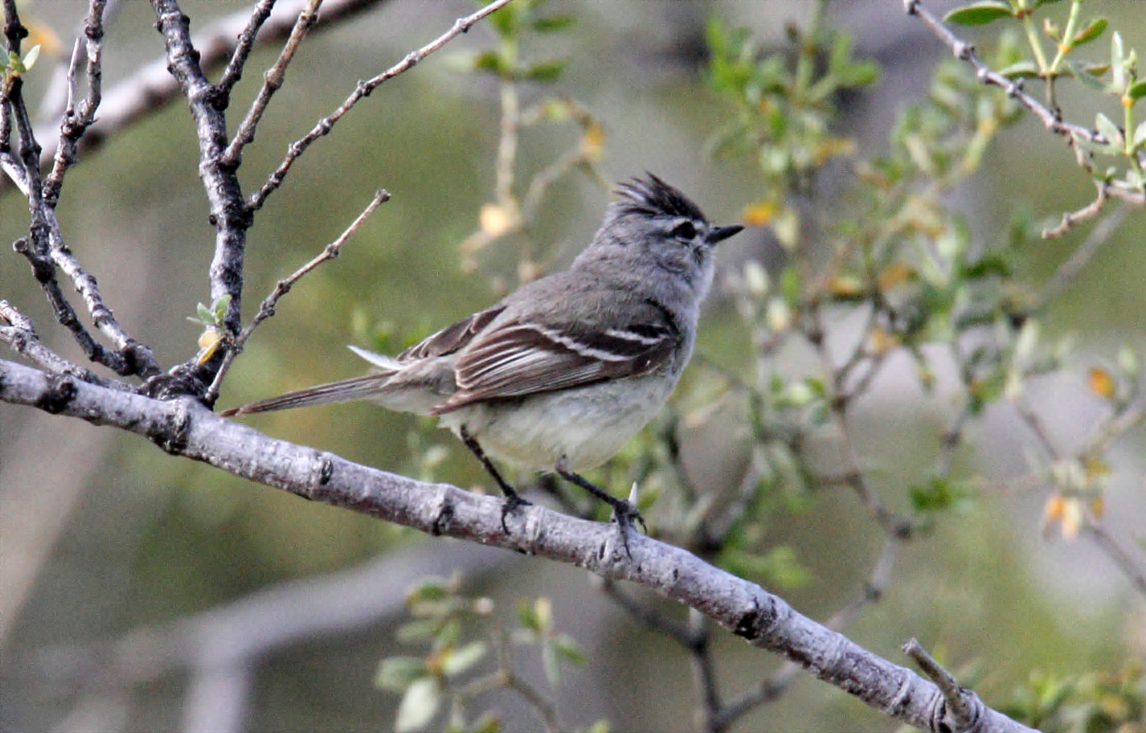 Straneck's Tyrannulet (Serpophaga griseicapilla)